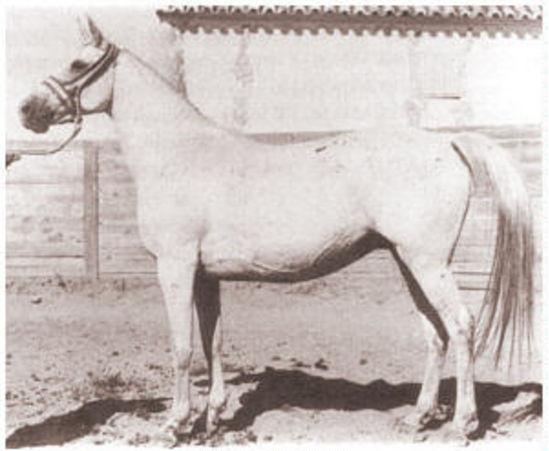 琉球競馬の競走馬、ヒコーキ号。昭和3年頃に活躍[1]。